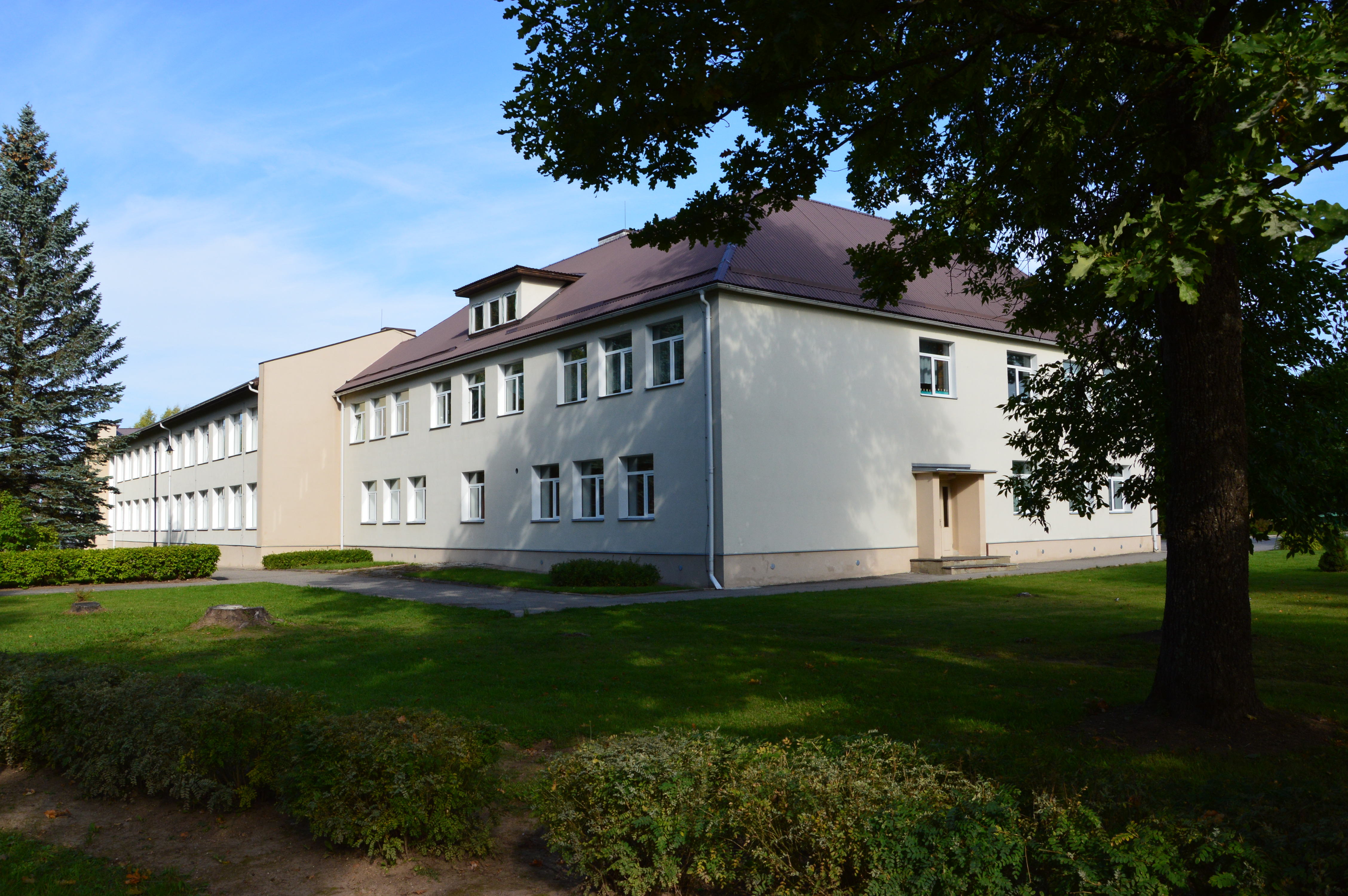 Kanepi Gümnaasium